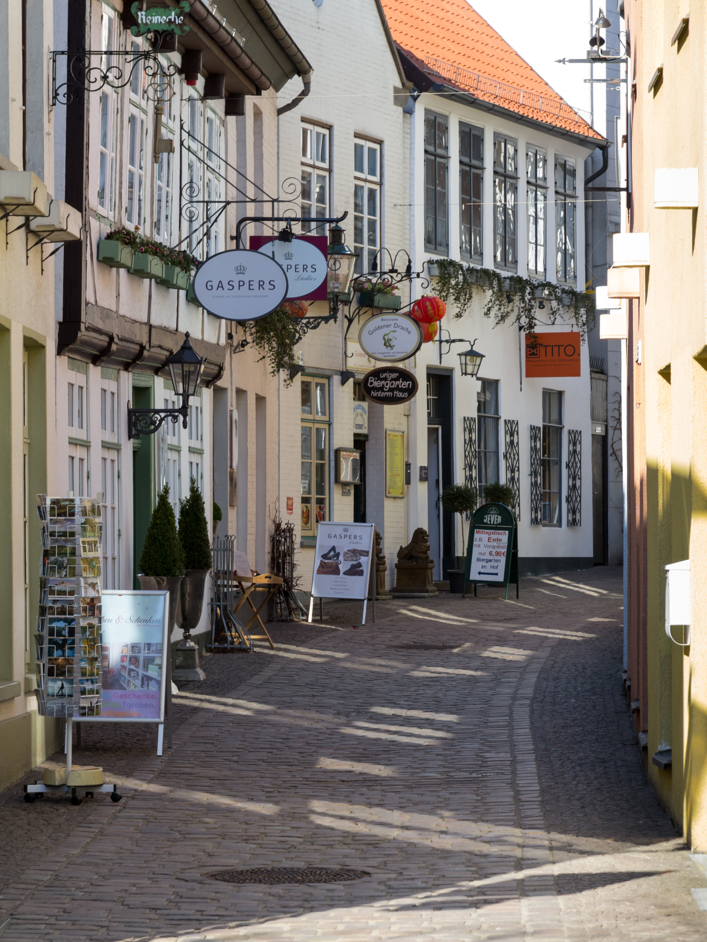 Bergstraße in Oldenburg (Oldb) 2013